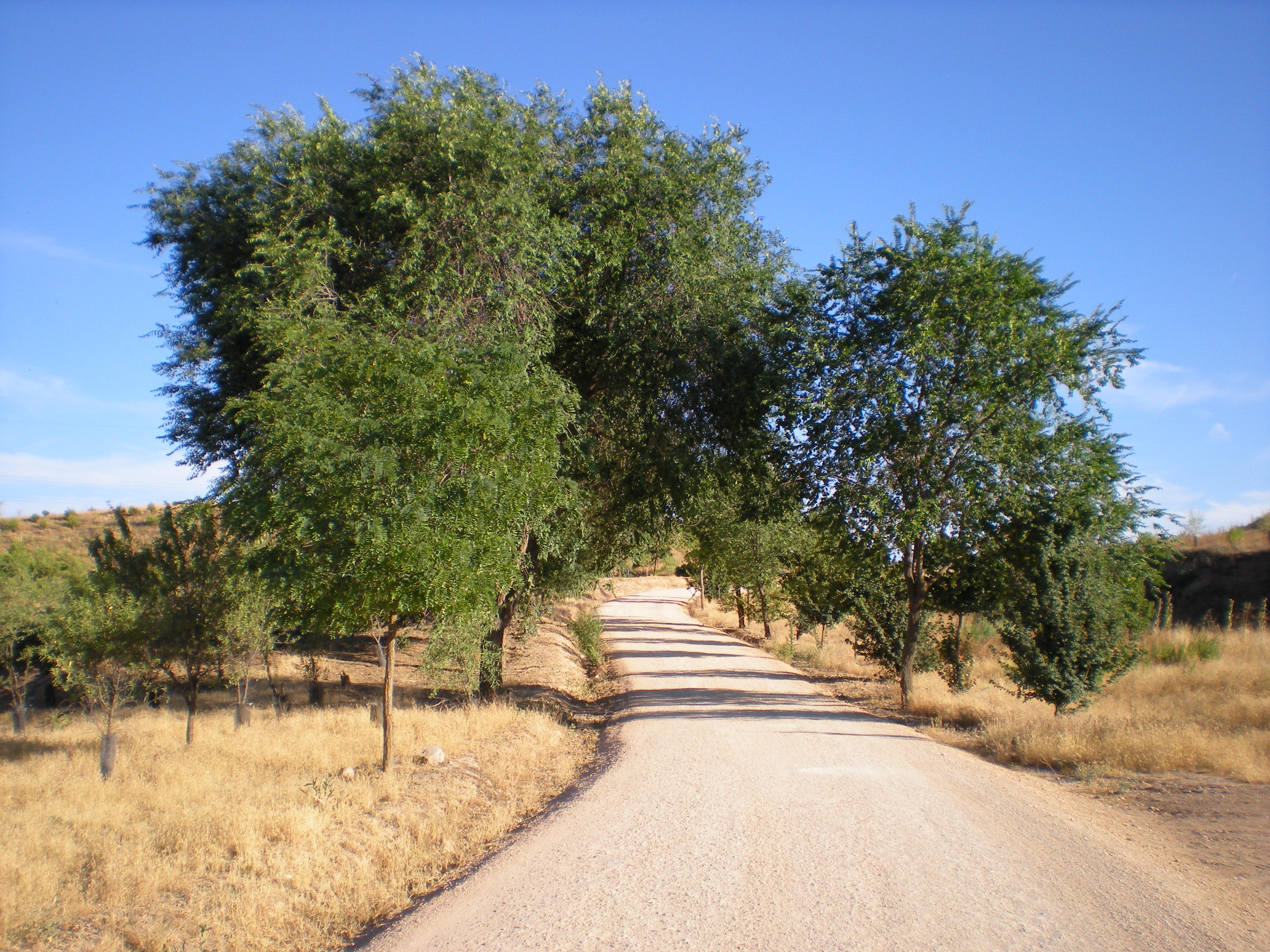 Parque de los Cerros. Alcalá de Henares Comunidad de Madrid. España